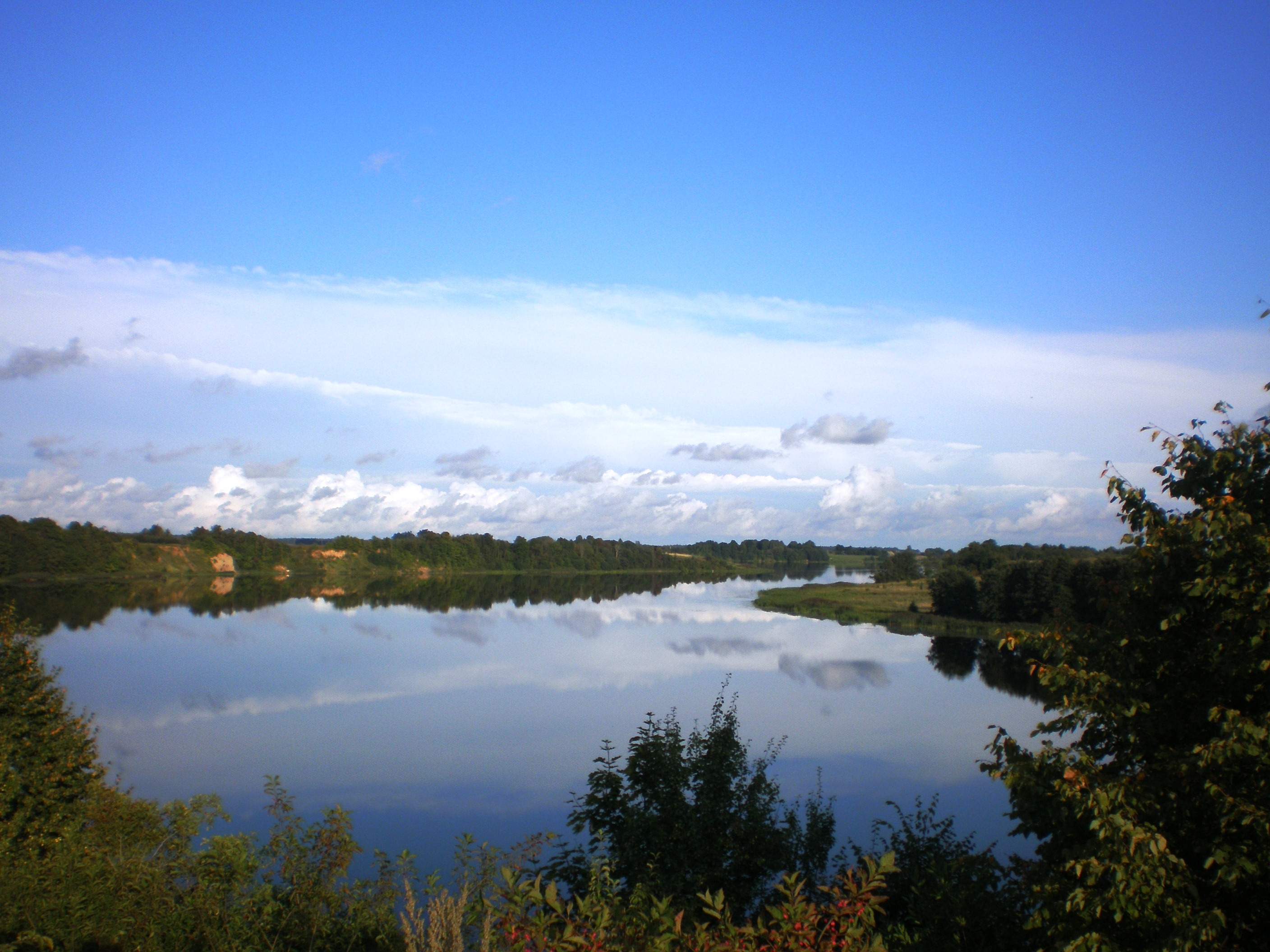 Angirių tvenkinys prie Pilsupių, Kėdainių rajonas, Lietuva